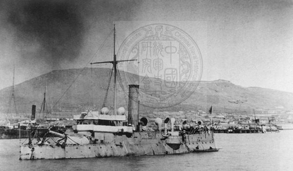 Фотография корабля "Пинъюань"